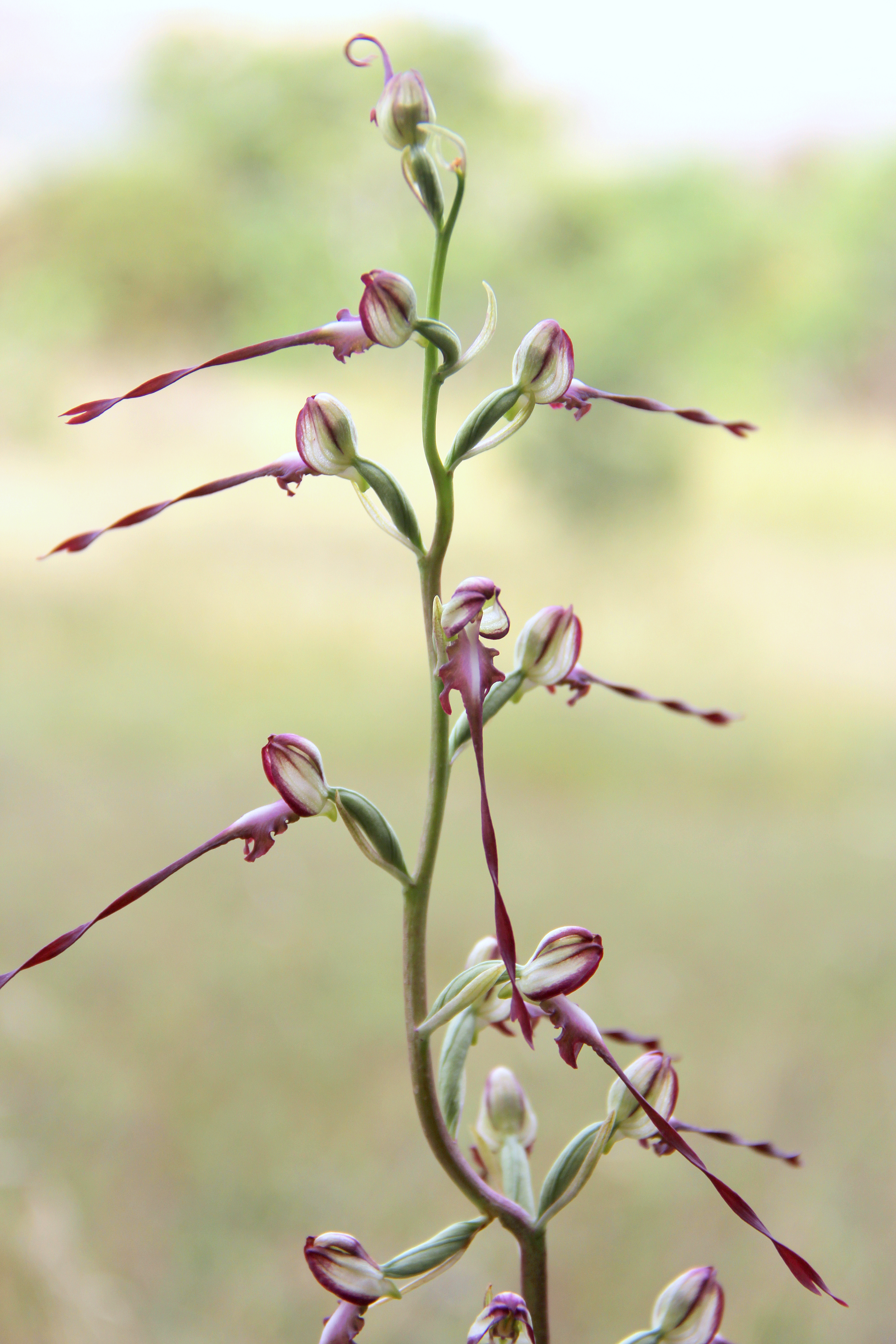 Yer:Mardin Himantoglossum affine